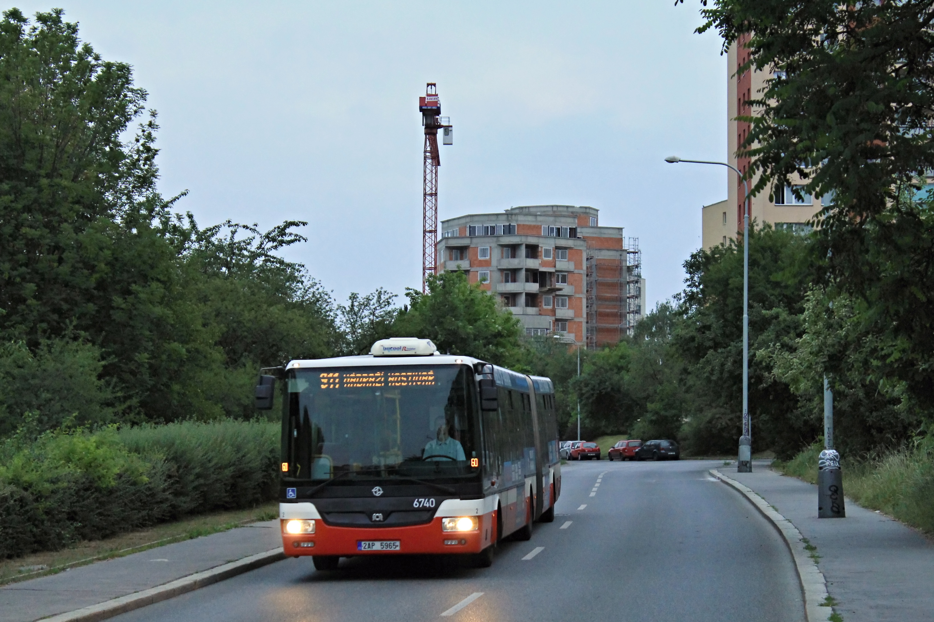 Noční linka 911, Praha Hostivař, SOR NB 18